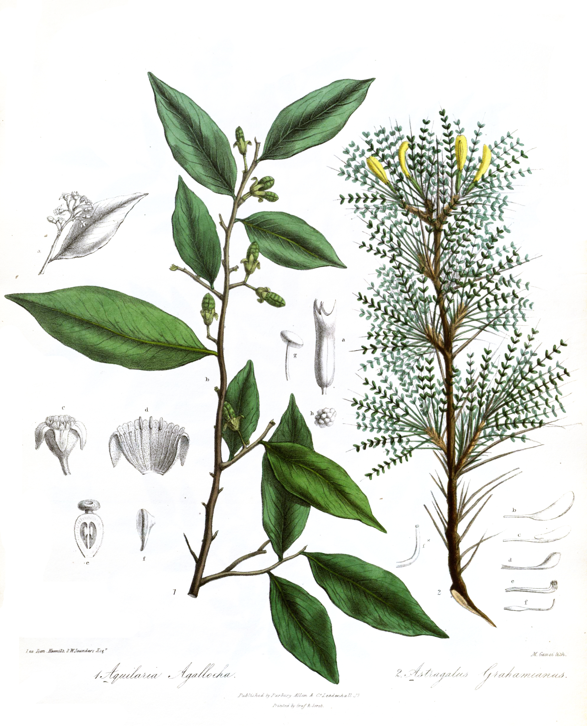 Aquilaria agallocha, Astragalus grahamiana